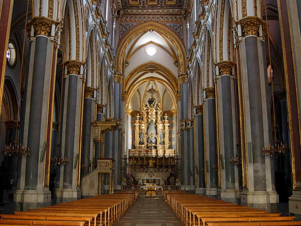 Napoli - Chiesa di San Domenico Maggiore (interno) Foto personale